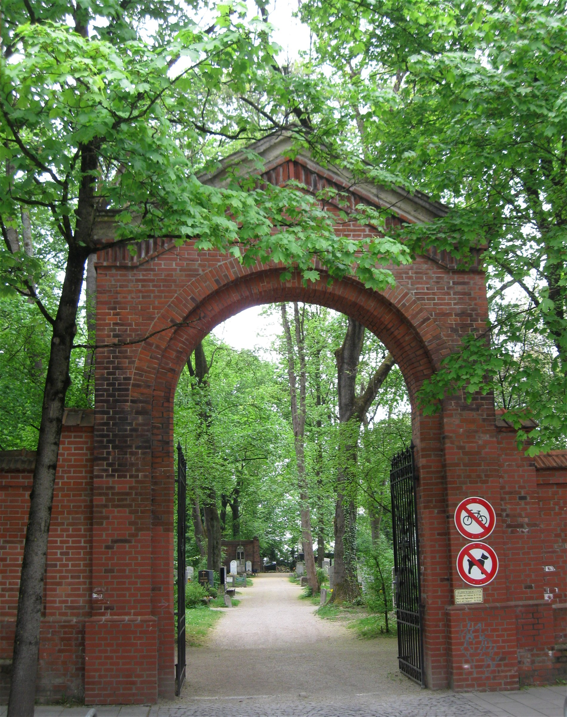 Kirchenstraße 39; Alte Kath. Pfarrkirche St. Johann Baptist, einschiffiger barocker Saalraum mit eingezogenem Chor, Westturm und Grabdenkmäler an der Außenseite, im Kern romanisch, 1493 spätgotisch verändert, 1698-1700 Umbau, 1712 Turm nach Brand erneuert, Spitzhelm 1864; mit Ausstattung; Friedhof, ältester Teil erstmals 1315 erwähnt, im 19./20. Jh. mehrfach nach Norden erweitert; Friedhofsmauer, rohbacksteinerne Umfassungsmauer mit ostseitigem Torbogen und Freitreppenanlage vor der Kirche, Treppenanlage 1776, Mauer 2. Hälfte 19. Jh.